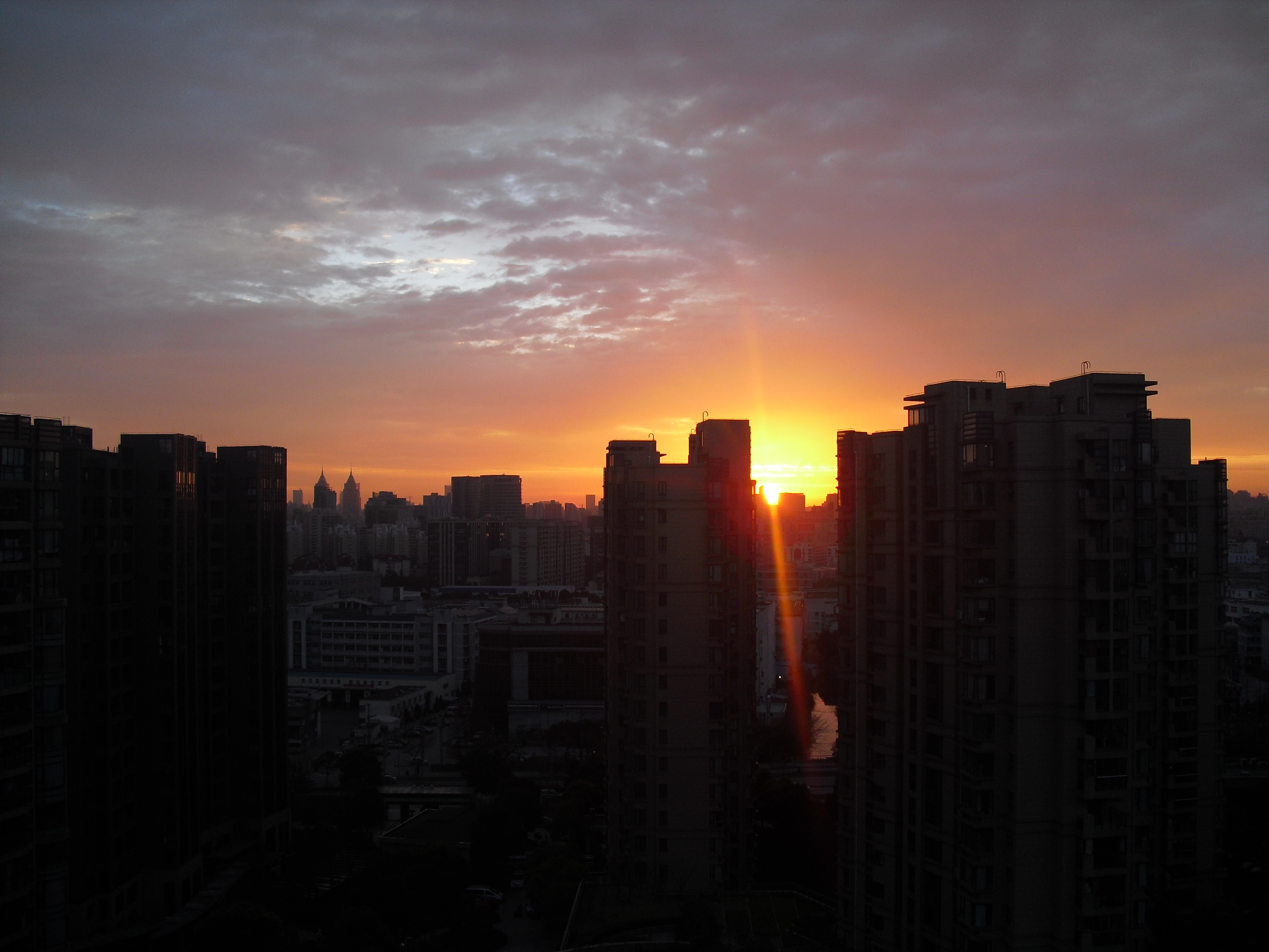 晨曦。摄于上海市。吴语: 晨曦。勒拉上海拍个。